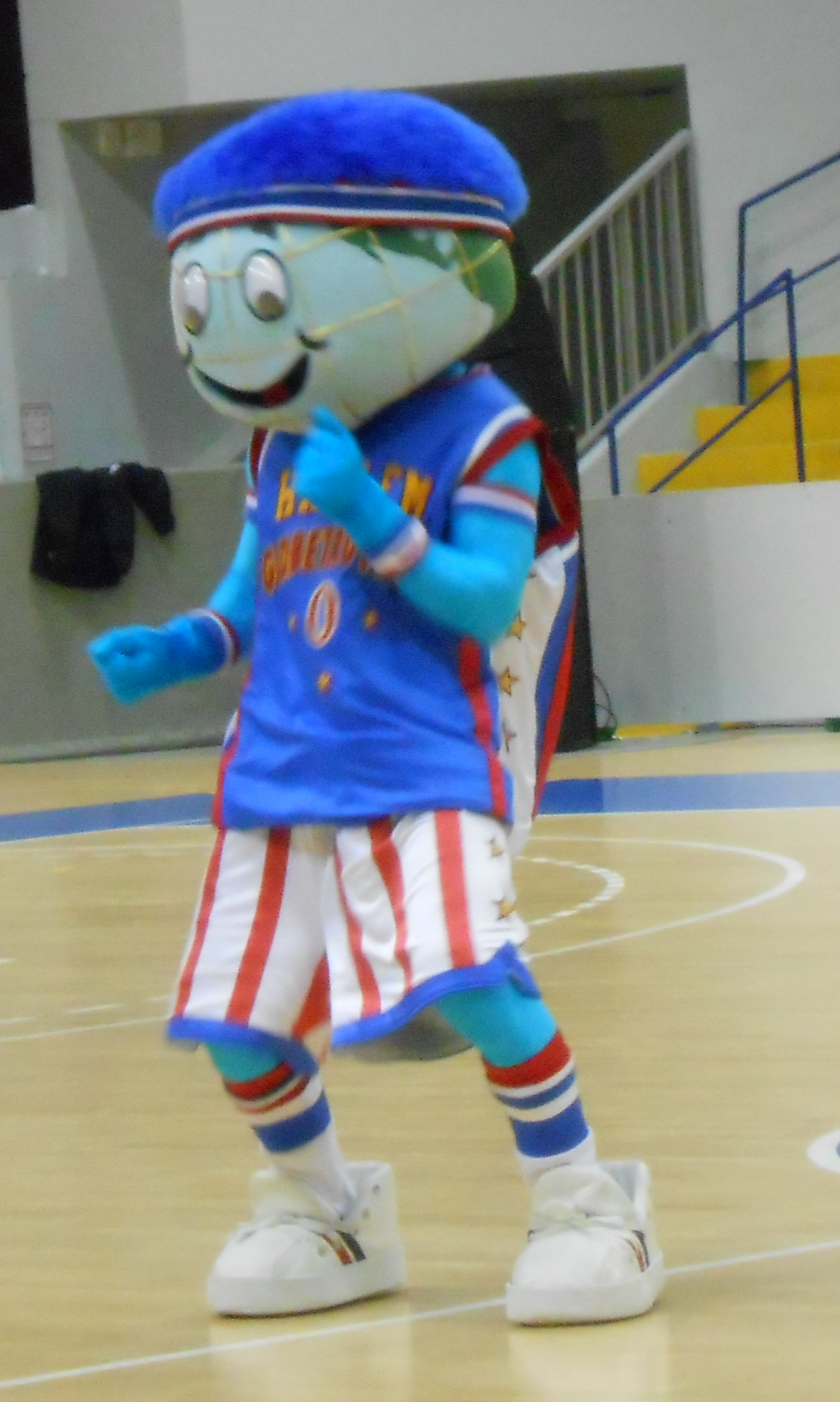 Globie, mascotte des Harlem Globe Trotters en 2013 à Reims